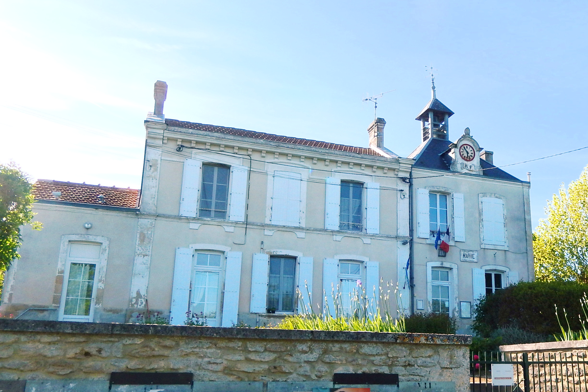 La mairie de Saint-Séverin-sur-Boutonne (Charente-Maritime, France).